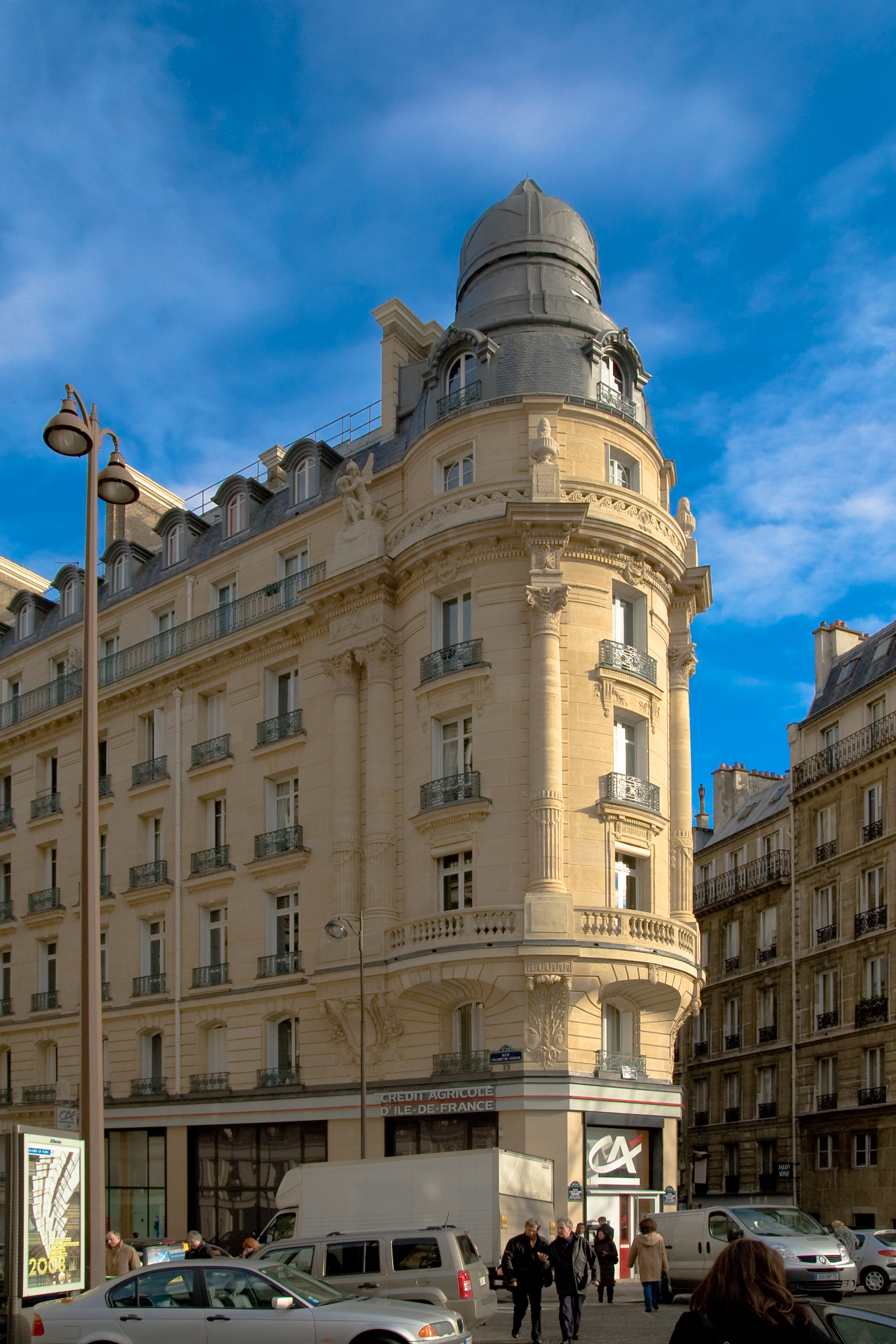 Crédit Agricole, Place Yvon-et-Claire-Morandat, Paris.